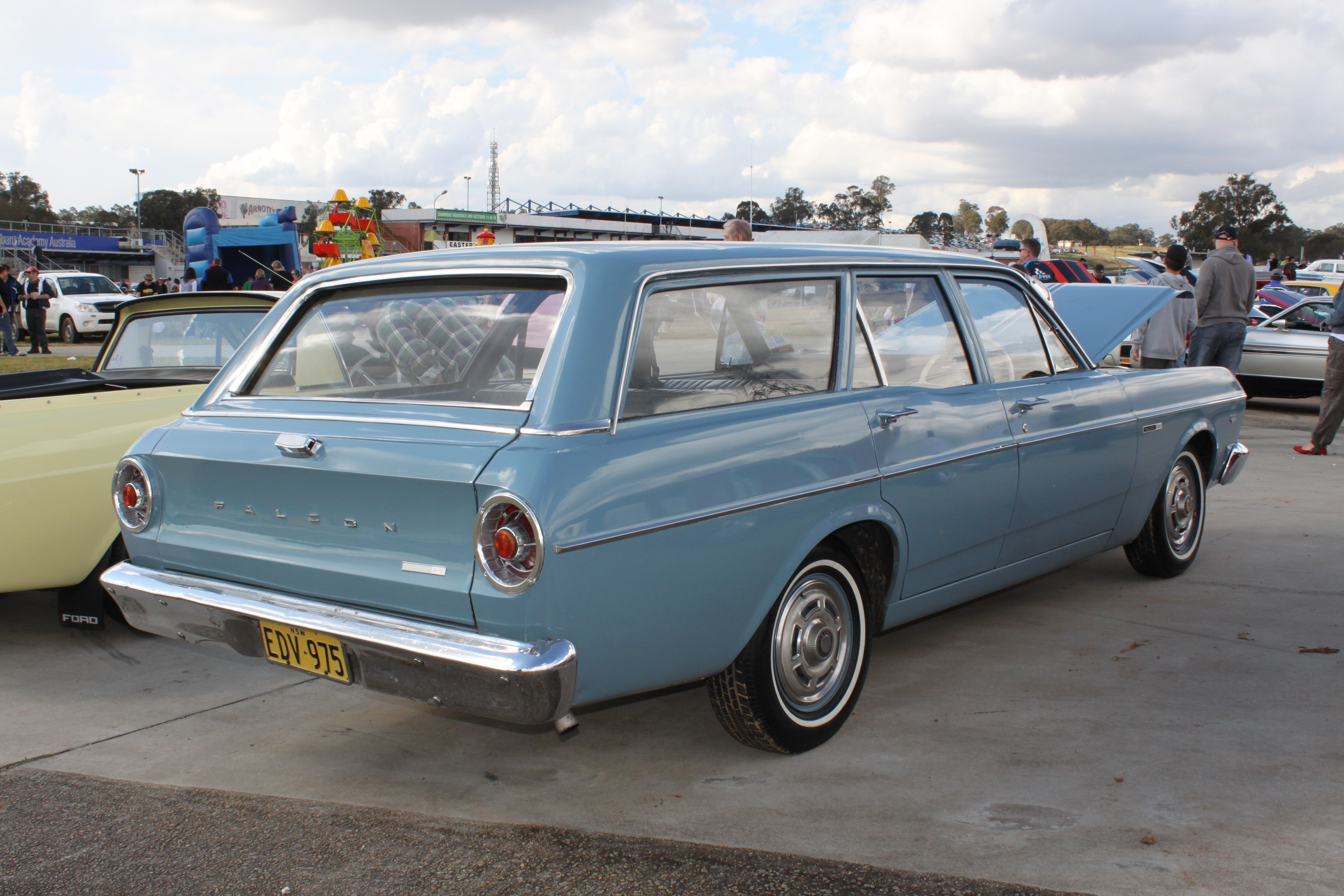 Ford Falcon XR Wagon